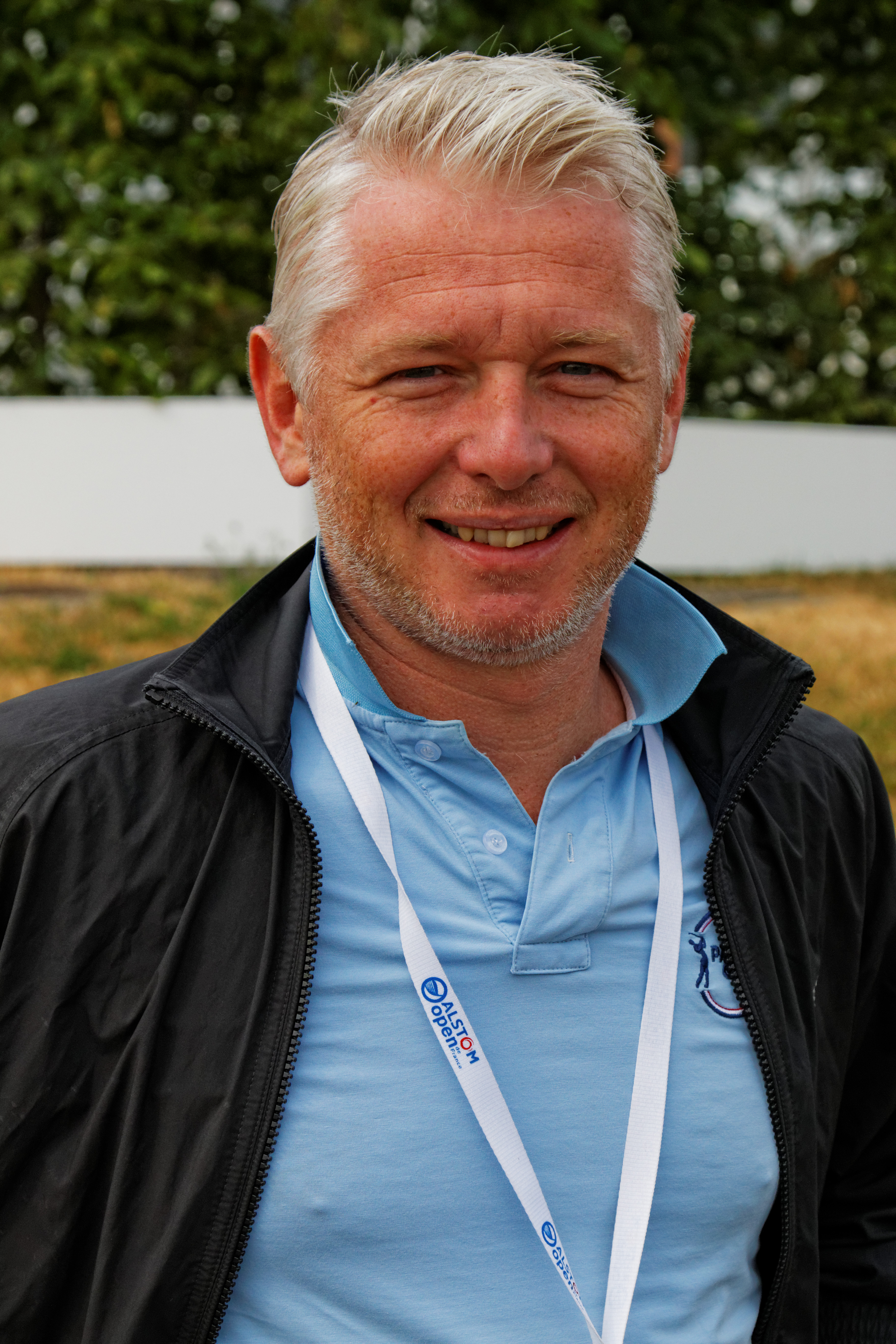 Cyrille Bougaux lors de l'Alstom - Open de France 2015